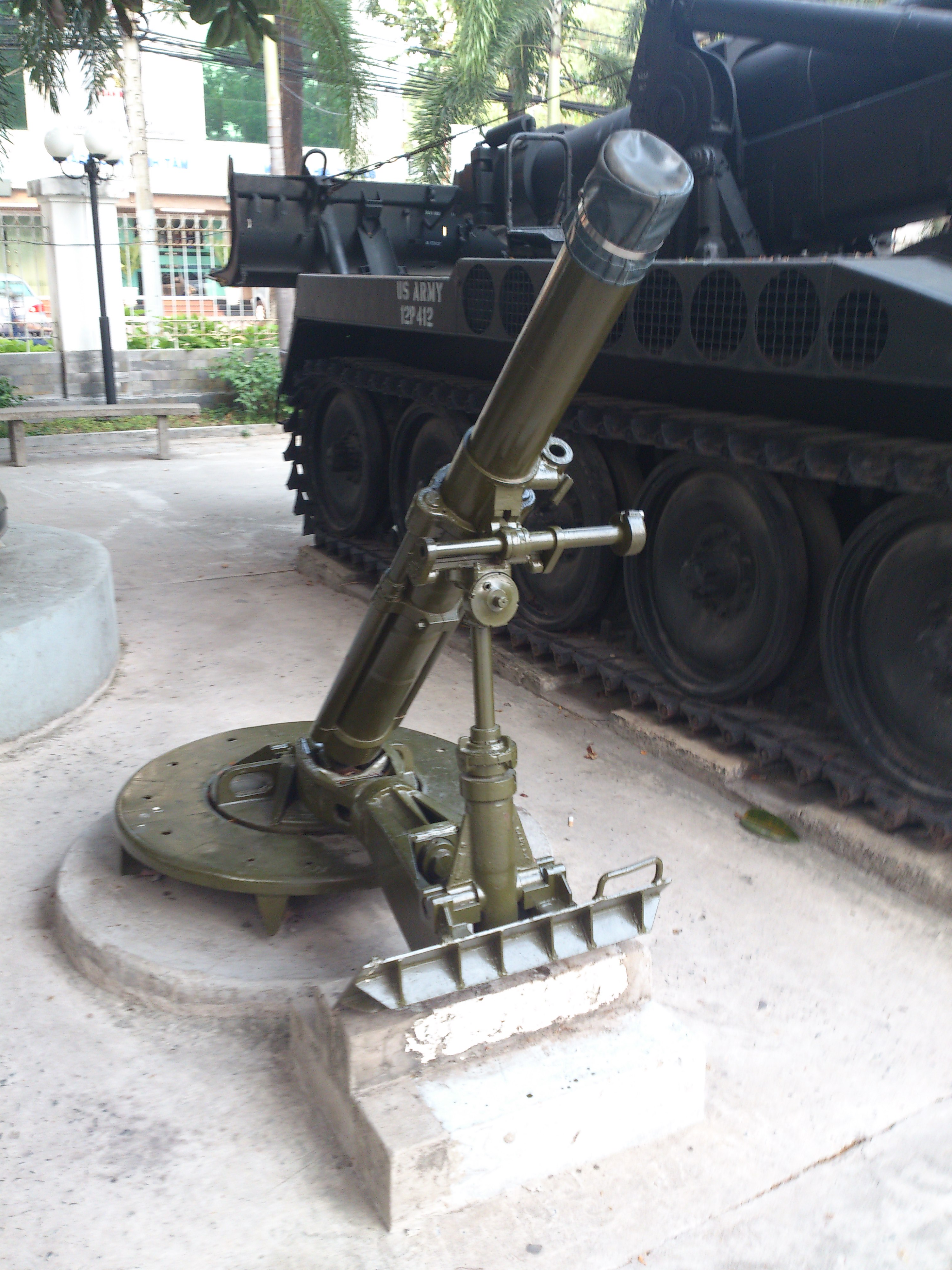 ベトナム・ホーチミン市の戦争証跡博物館に展示されているM30迫撃砲。